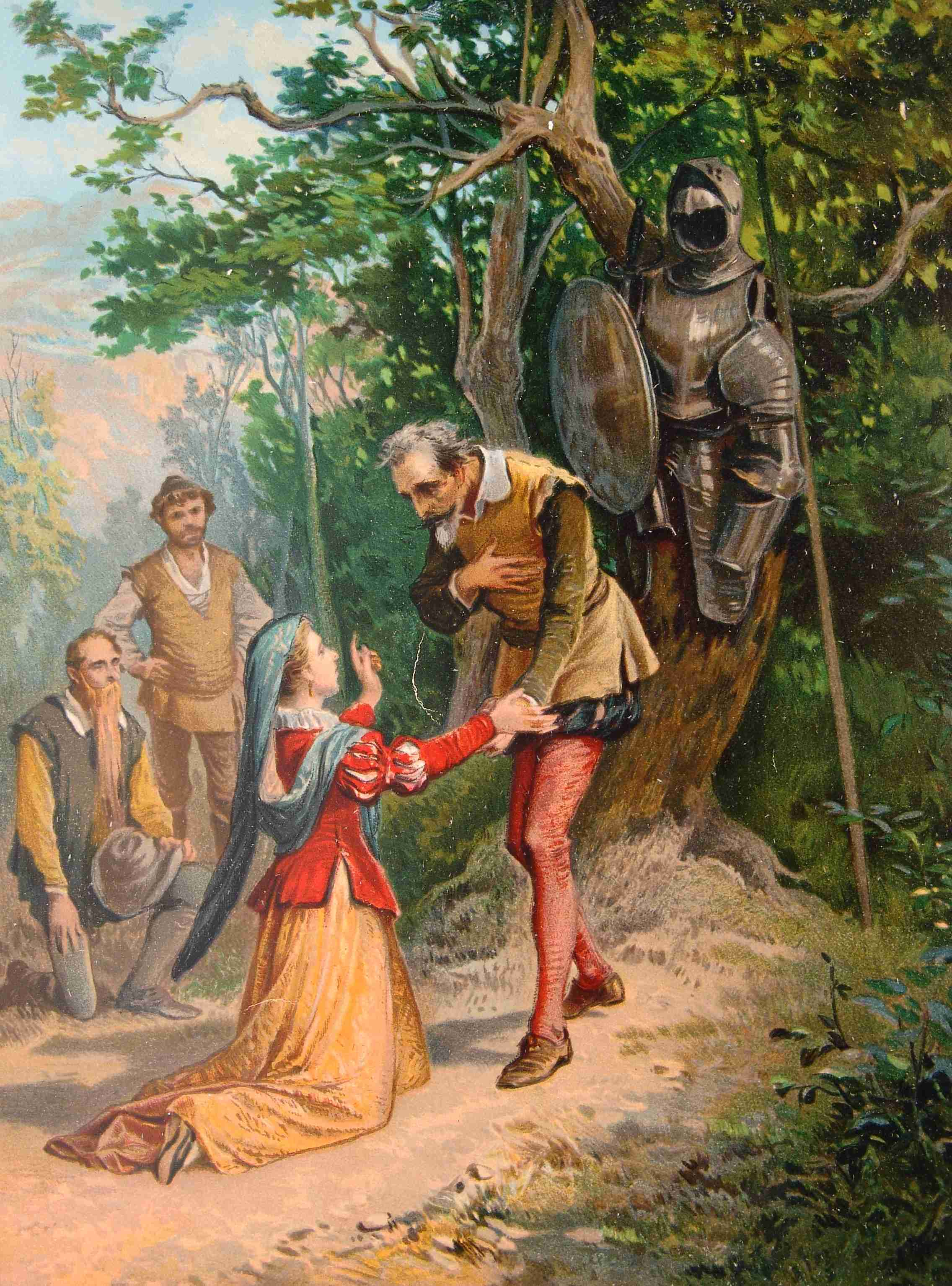 202_075_quijote_cap29